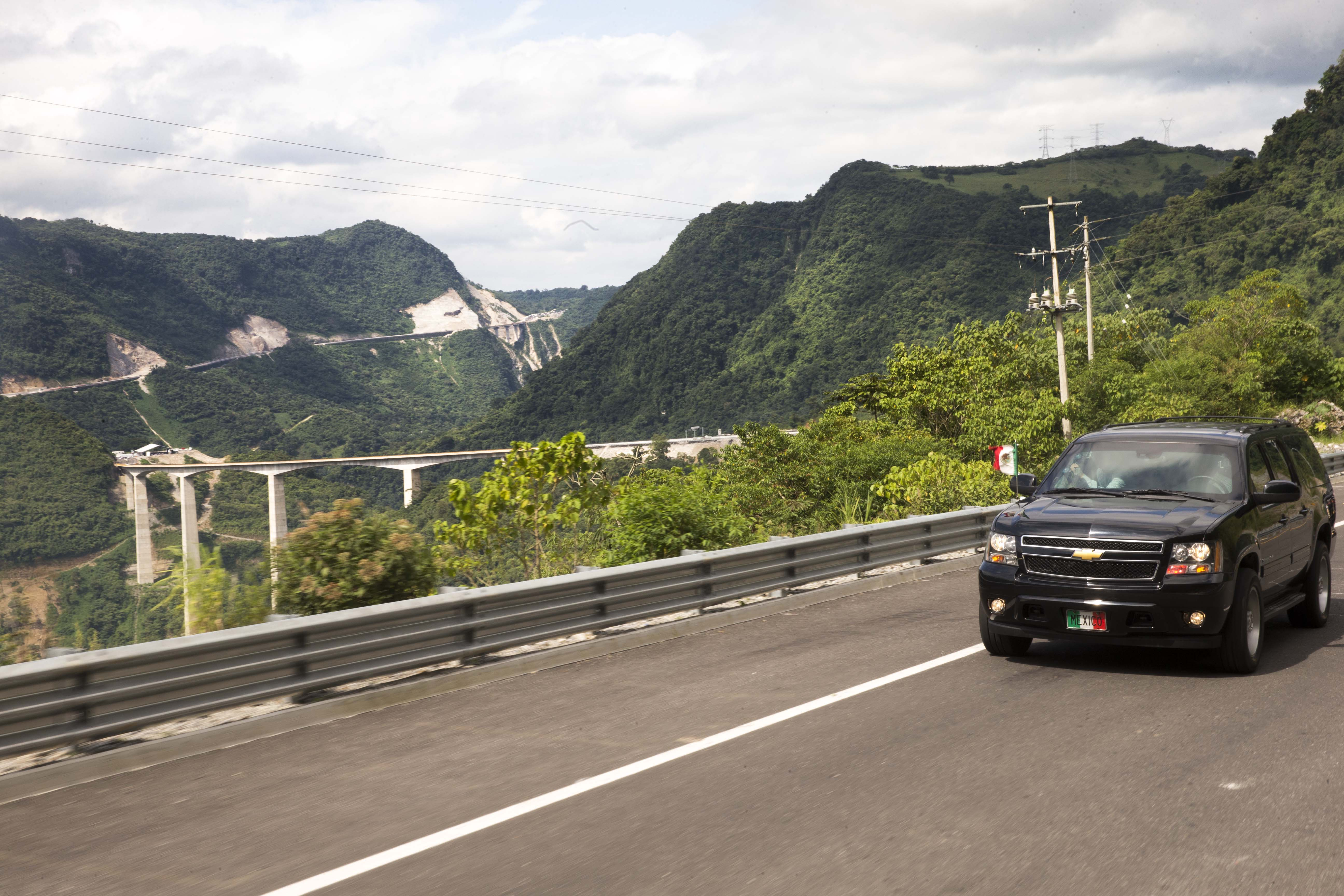 Corredor México-Tuxpan a su paso por Tlacuilotepec, Puebla.